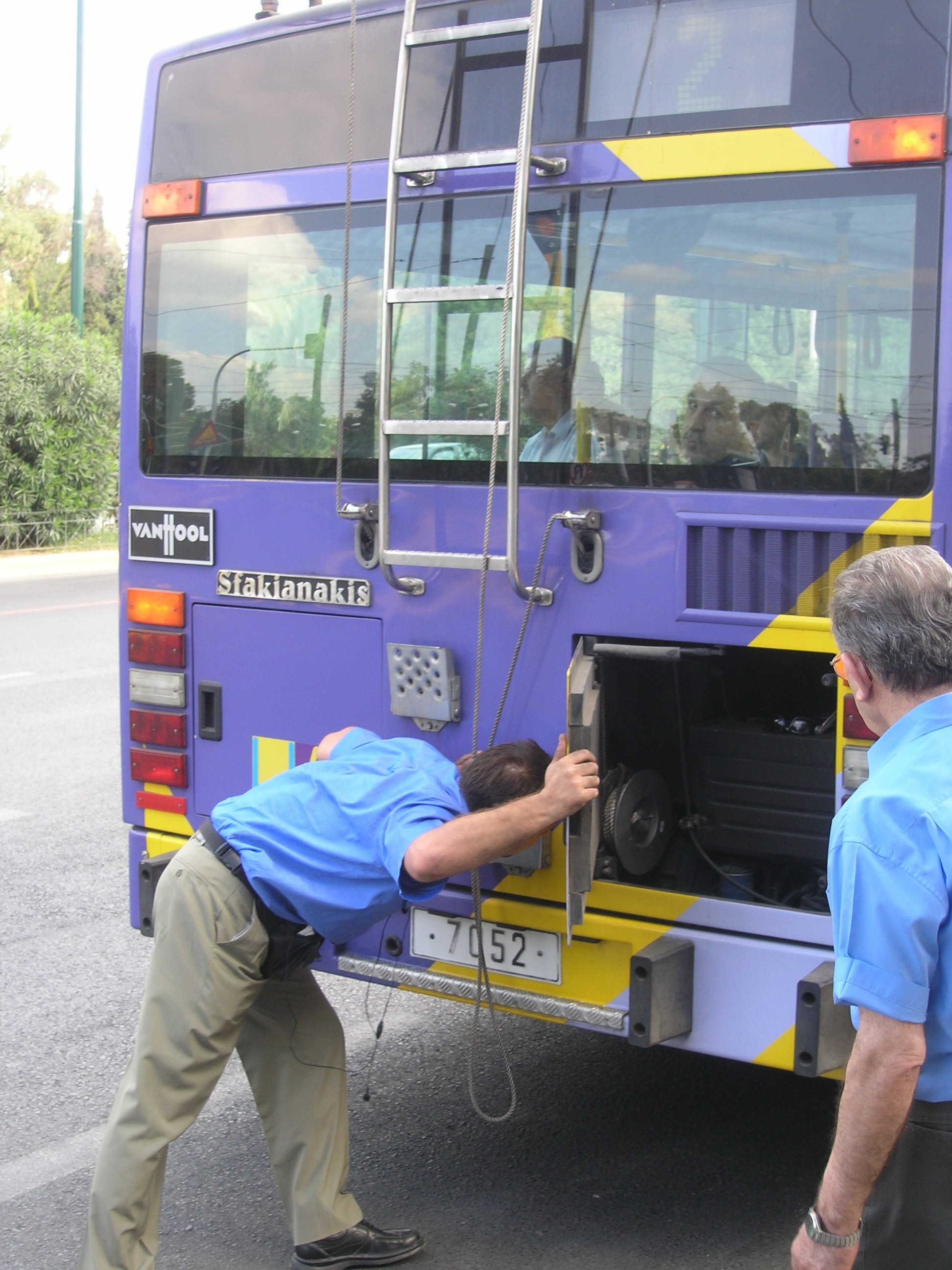 O-Bus in Athen